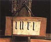 INRI des Isenheimer Altares